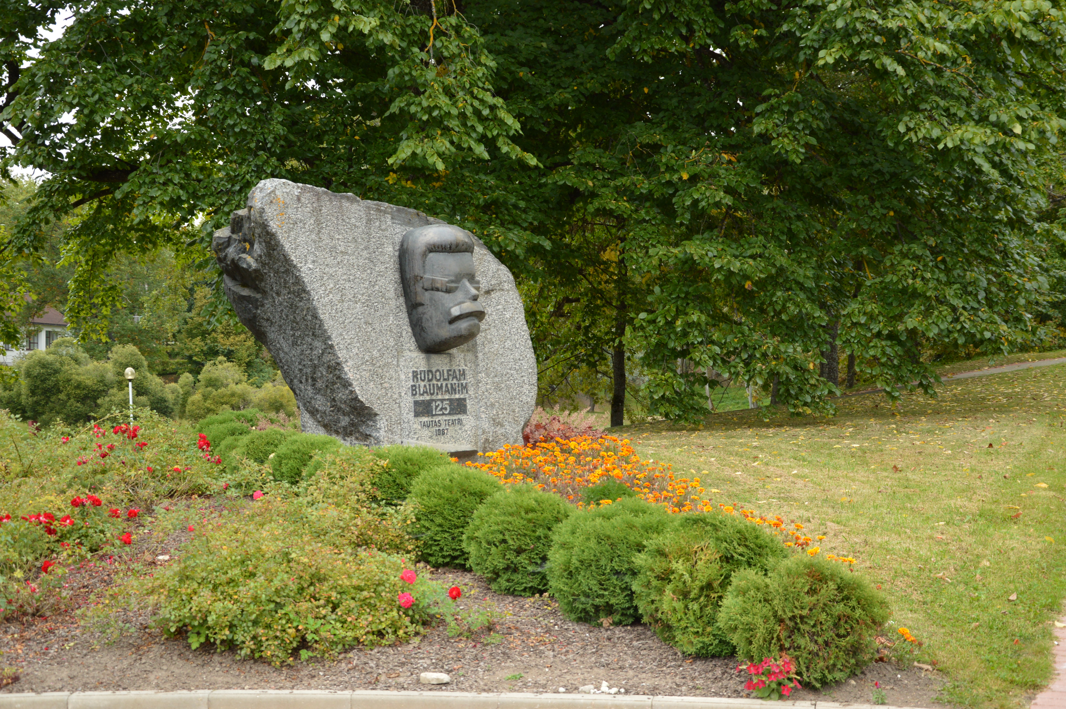 Rudolfam Blaumanim mälestuskivi kultuurimaja lähedal.